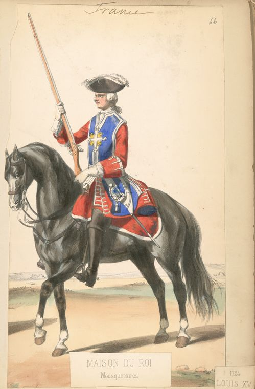 Mousquetair de la Garde en 1724